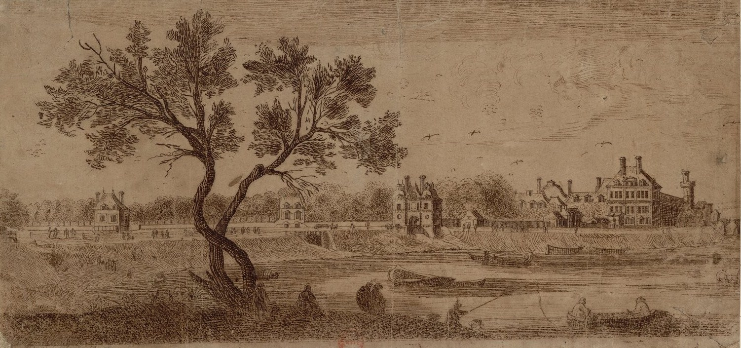 Vue et perspective du jardin des Tuileries. Sur la droite, la tour du Bois.